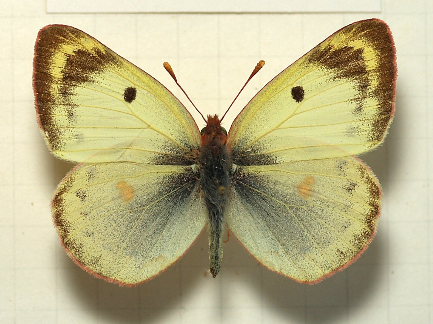 Colias hyale